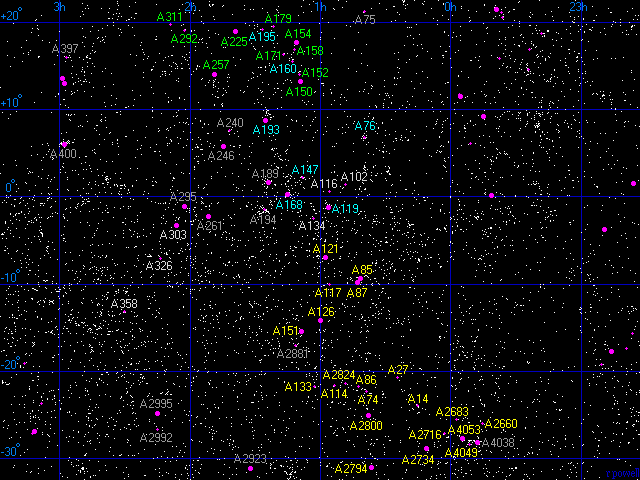 Mappa del Superammasso dei Pesci-Balena